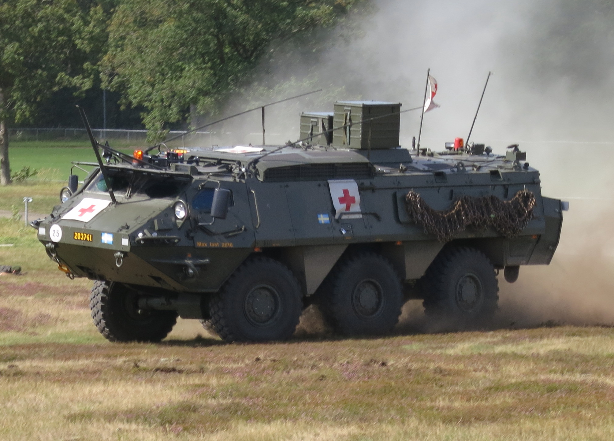 Pansarterrängbil 203 sjuktransport vid Regementets Dag på P7 Revingehed